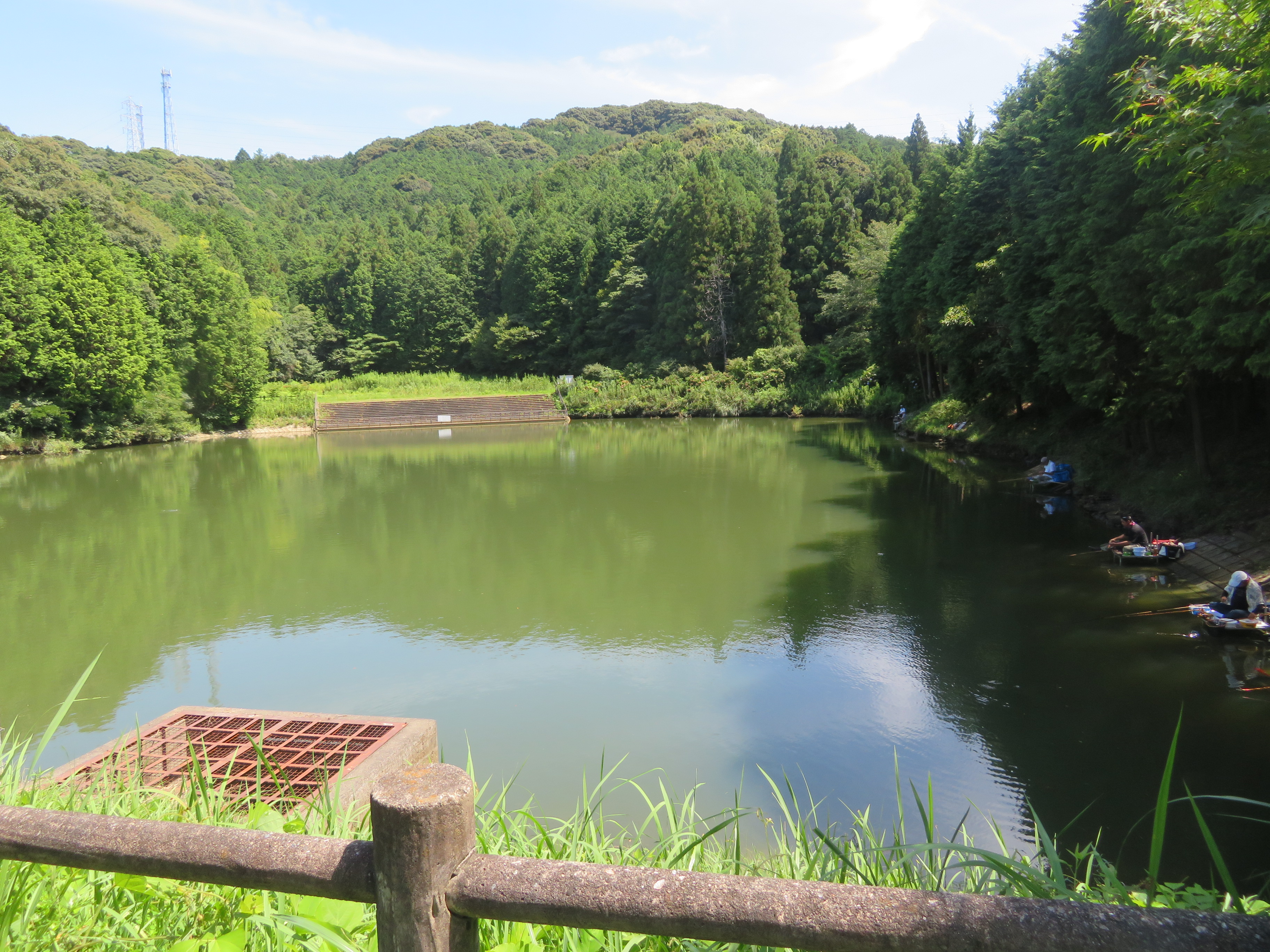 村積山自然緑道の奥山田池（岡崎市奥山田町）